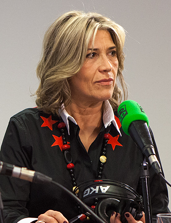 Lehendakariari elkarrizketa bat egingo diote Onda Cero irratian